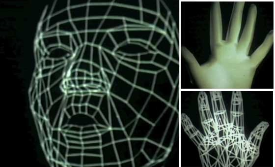 Primera animación 3D en el mundo, fue creada en 1972 por el fundador de Pixar Ed Catmull junto con Fred Parke y Robert Ingerbretsen.